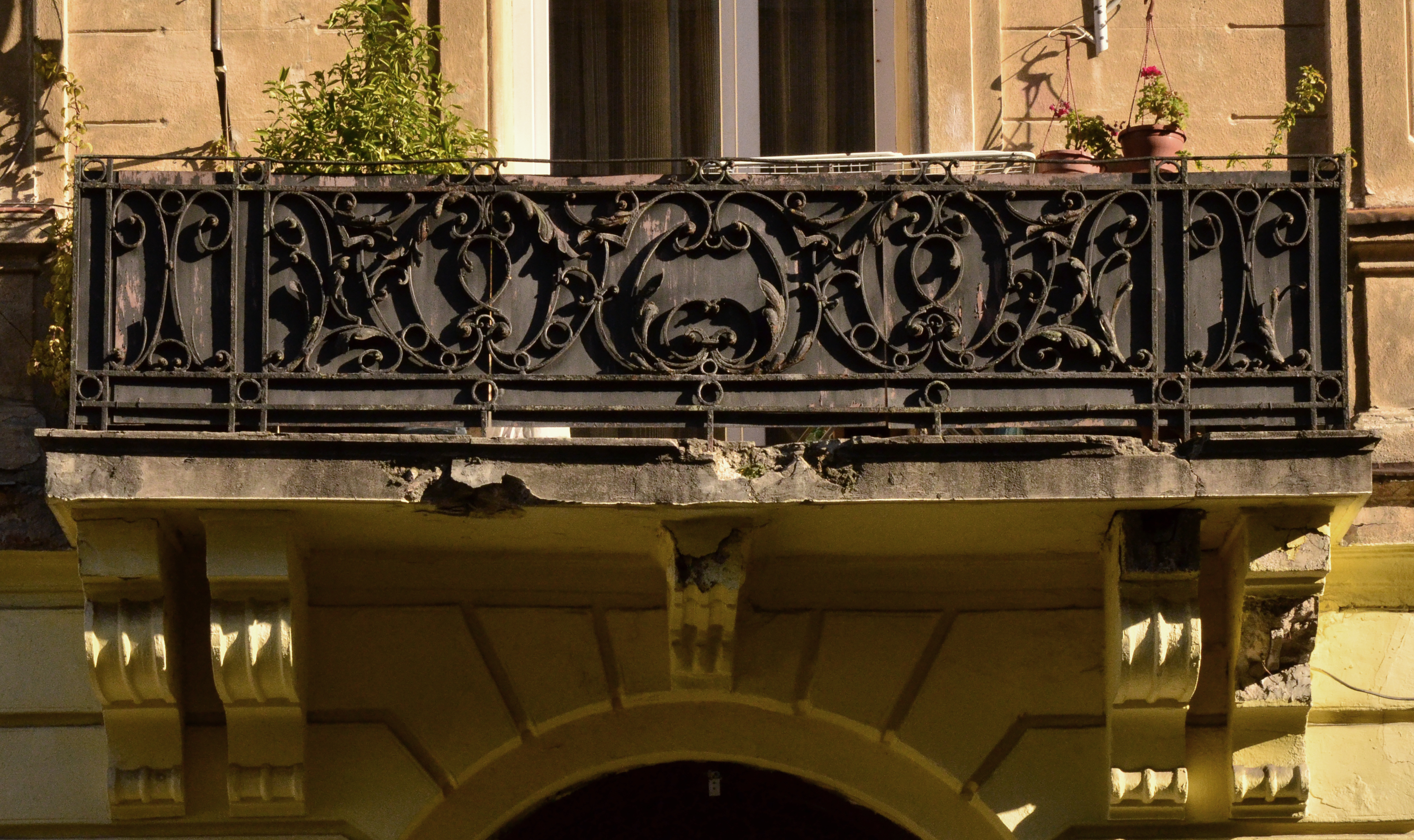 Балкон будинку № 21 на вулиці Пекарській у Львові.